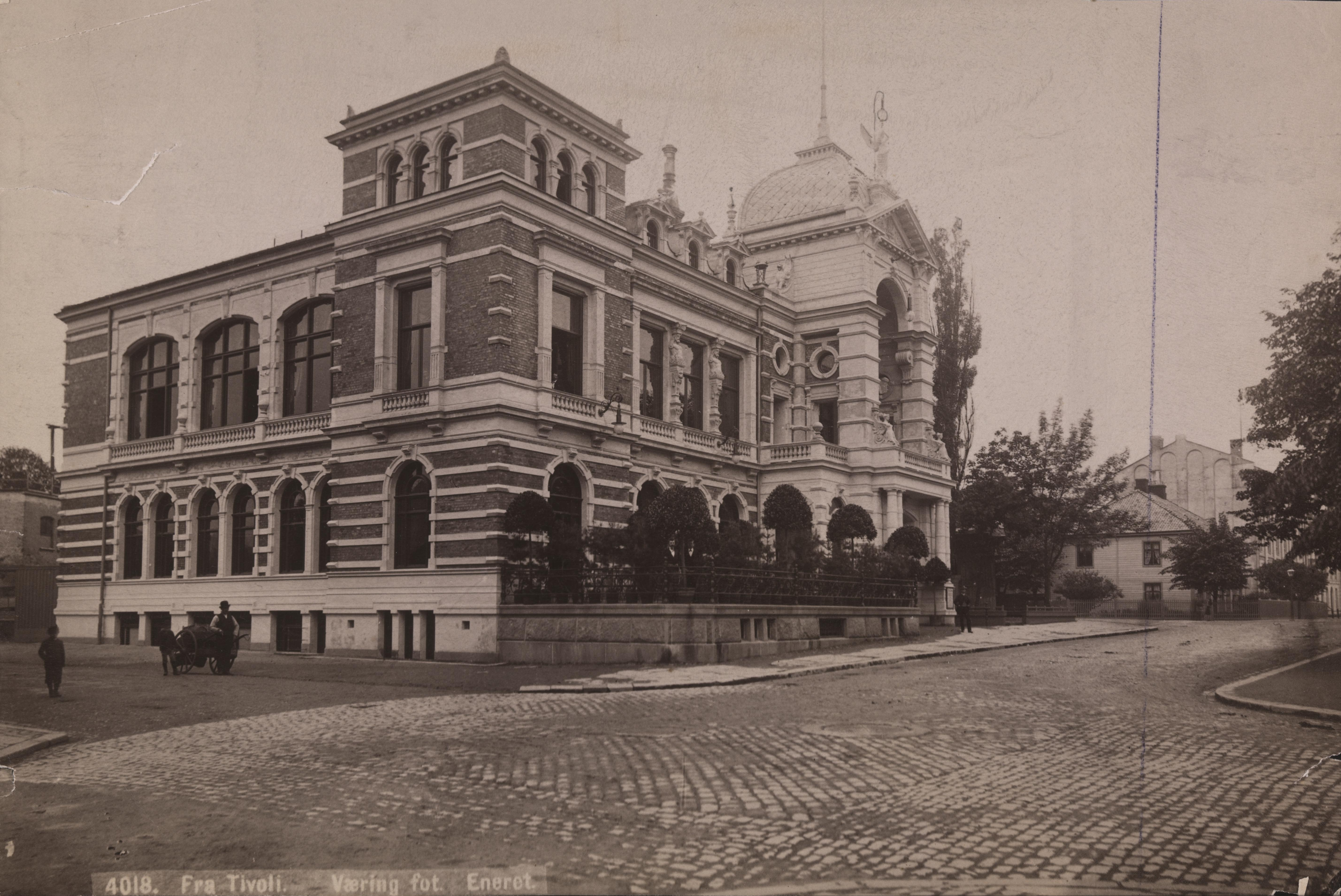 Bildet er hentet fra Nasjonalbibliotekets bildesamling Klingenberg, Oslo, Oslo